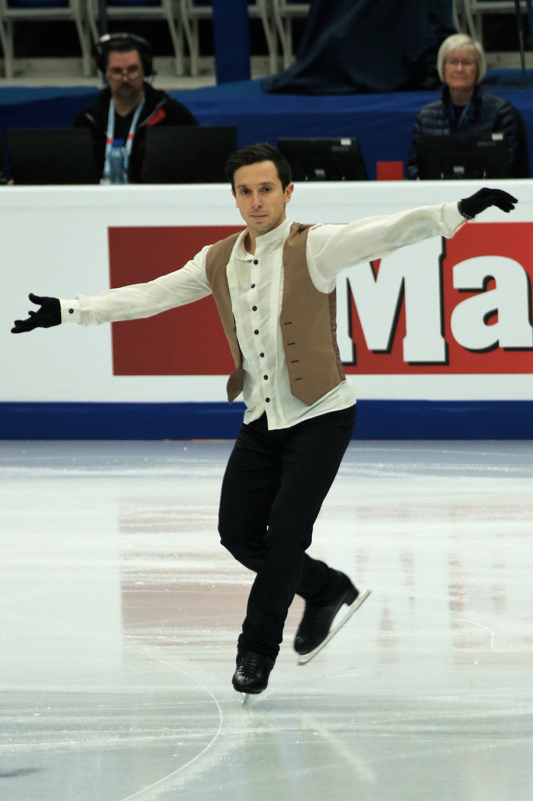 Алексей Быченко (Израиль) на Чемпионате Европы по фигурному катанию 2018.